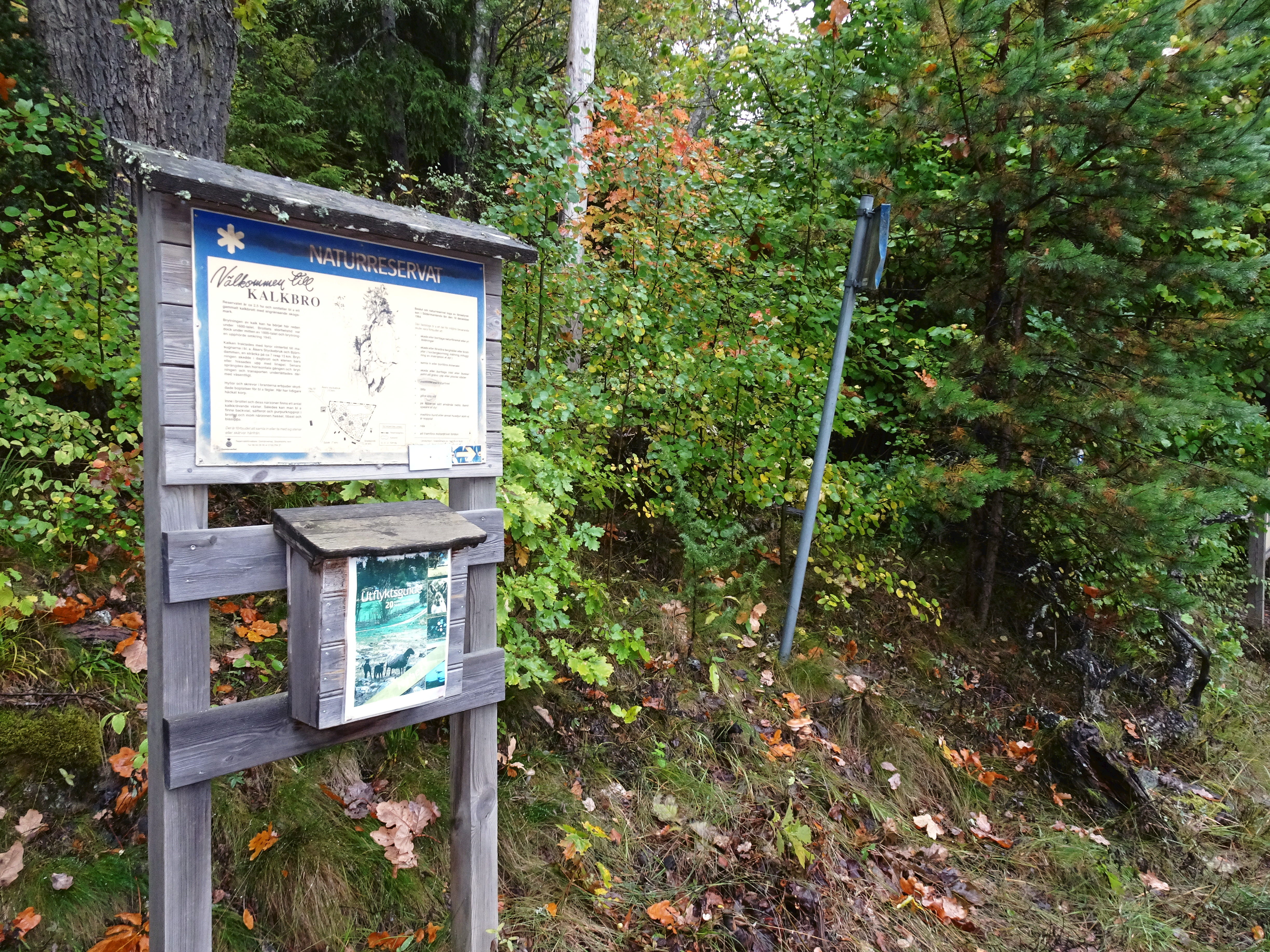 Kalkbro ingång till naturreservatet